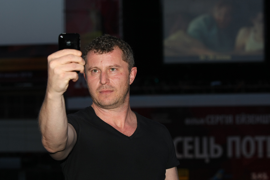 Вадим Перельман на Потемкинской лестнице, Одесский международный кинофестиваль-2010